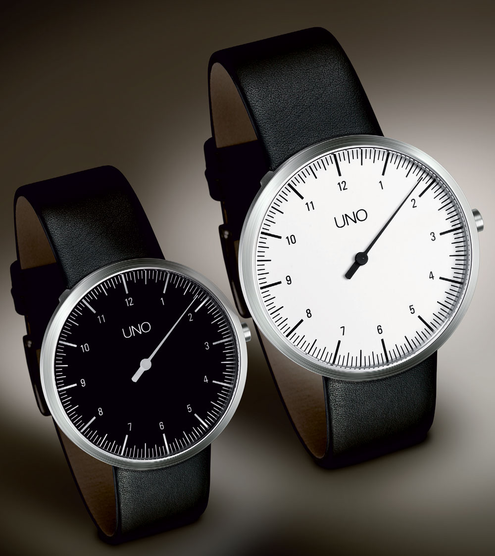 Einzeigeruhr UNO von Botta Design